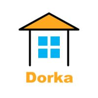 logo neziskovej organizácie